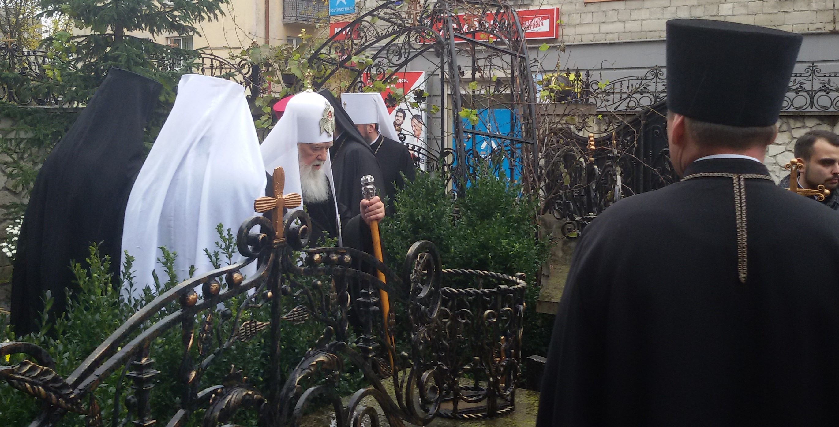 Візит Святійшого Патріарха Філарета на місце спочину Блаженнішого Митрополита Мефодія